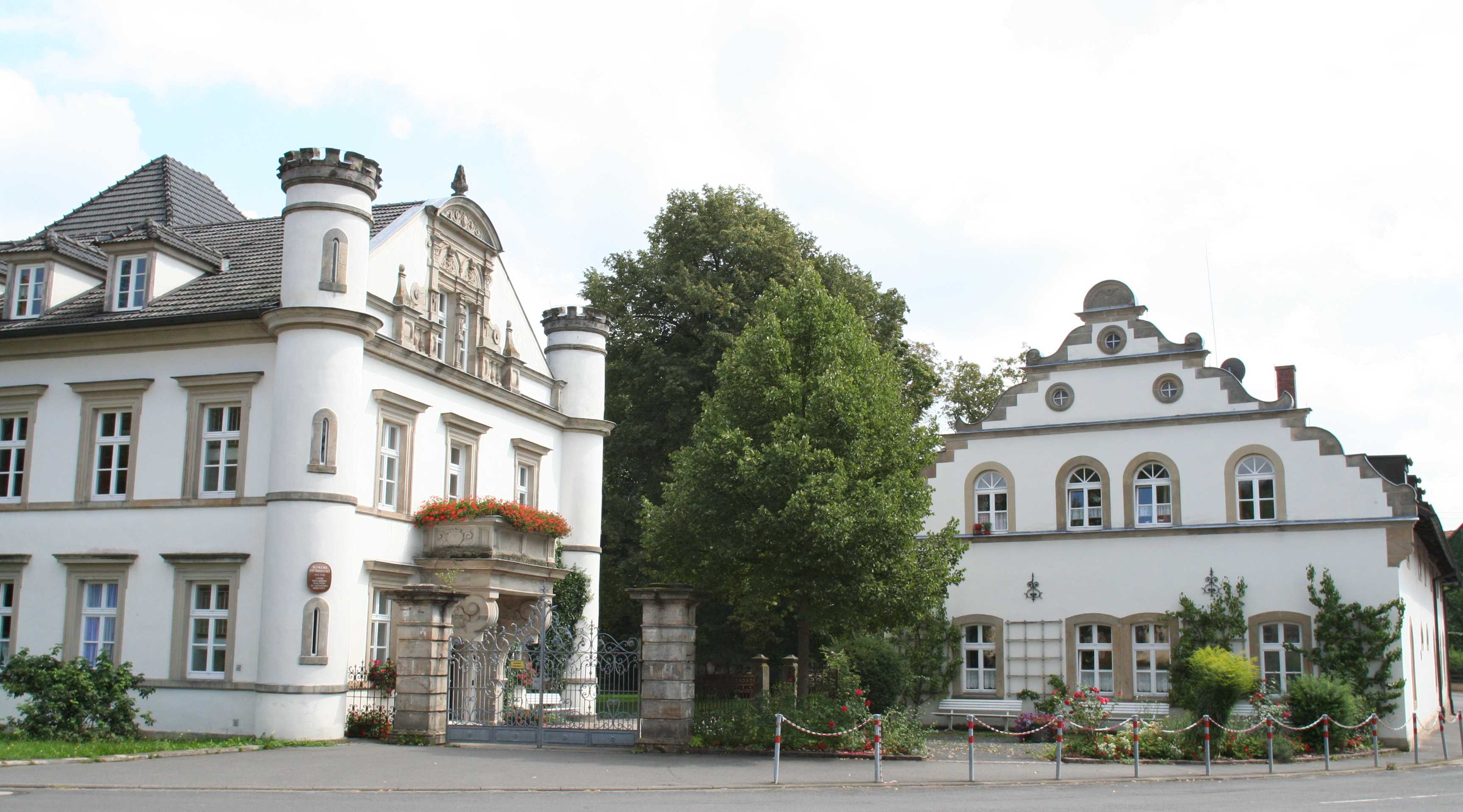 Schloss in Ditterswind, Teil der Gemeinde Maroldsweisach im Landkreis Haßberge in Bayern